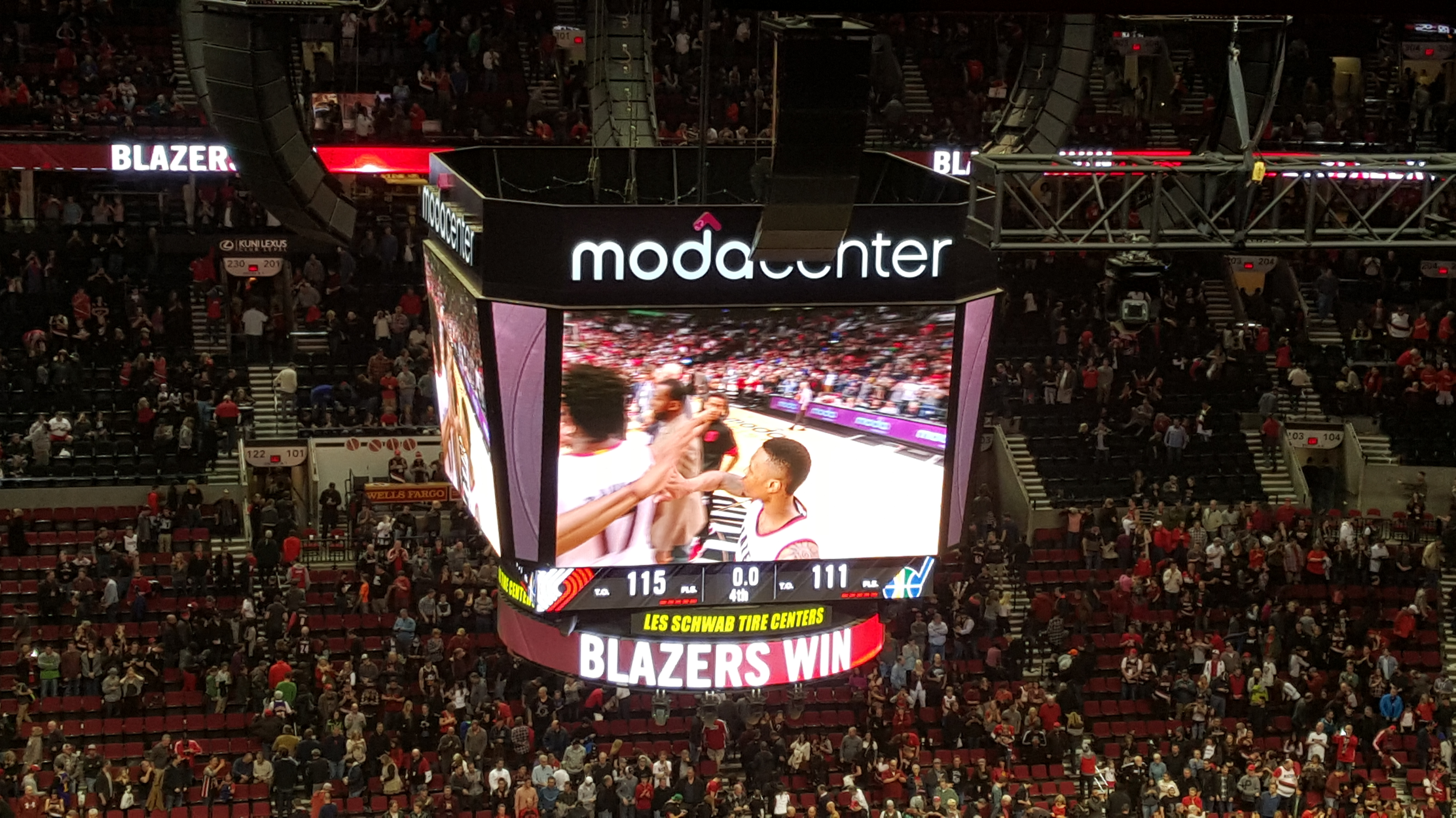 Moda Center